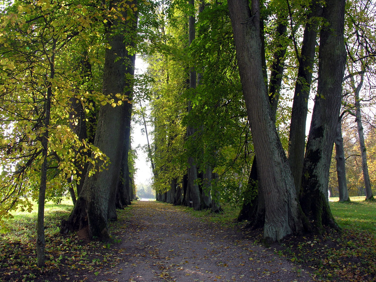 Vilniaus universiteto botanikos sodas Liepų alėja Foto: Algirdas, 2006 m. spalio 18 d.